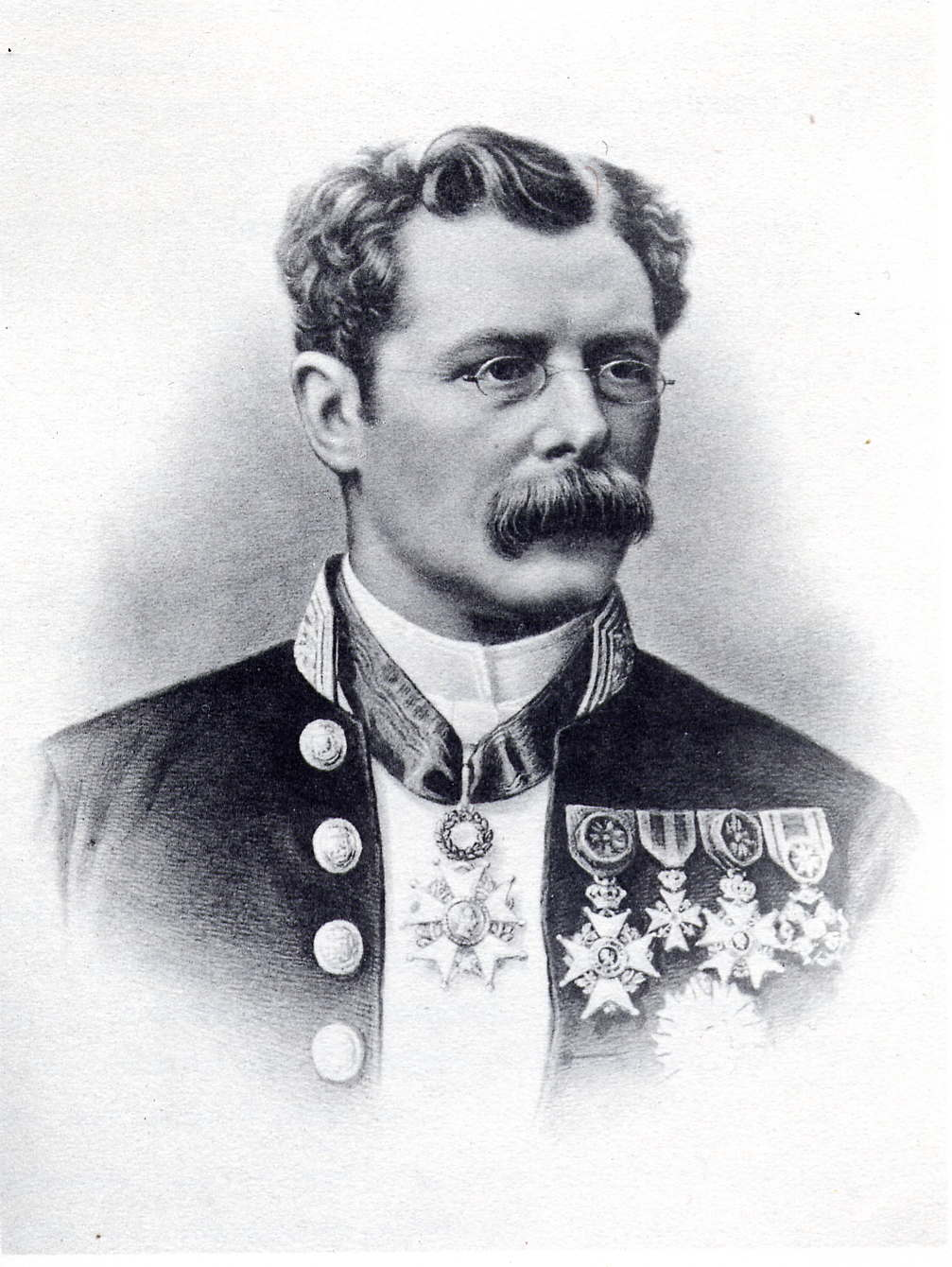 Lithographie de Jules Anspach, bourgmestre de Bruxelles, tirée du livre de Jules Garsou.